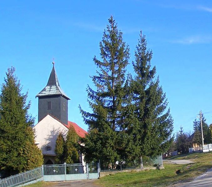 Obec Abranovce v okrese Prešov